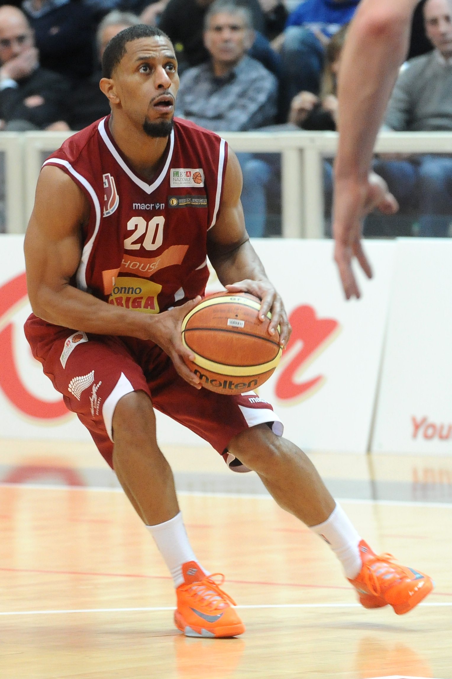 Kelvin Parker durante una partita della Pallacanestro Trapani contro l'Aquila Basket Trento.